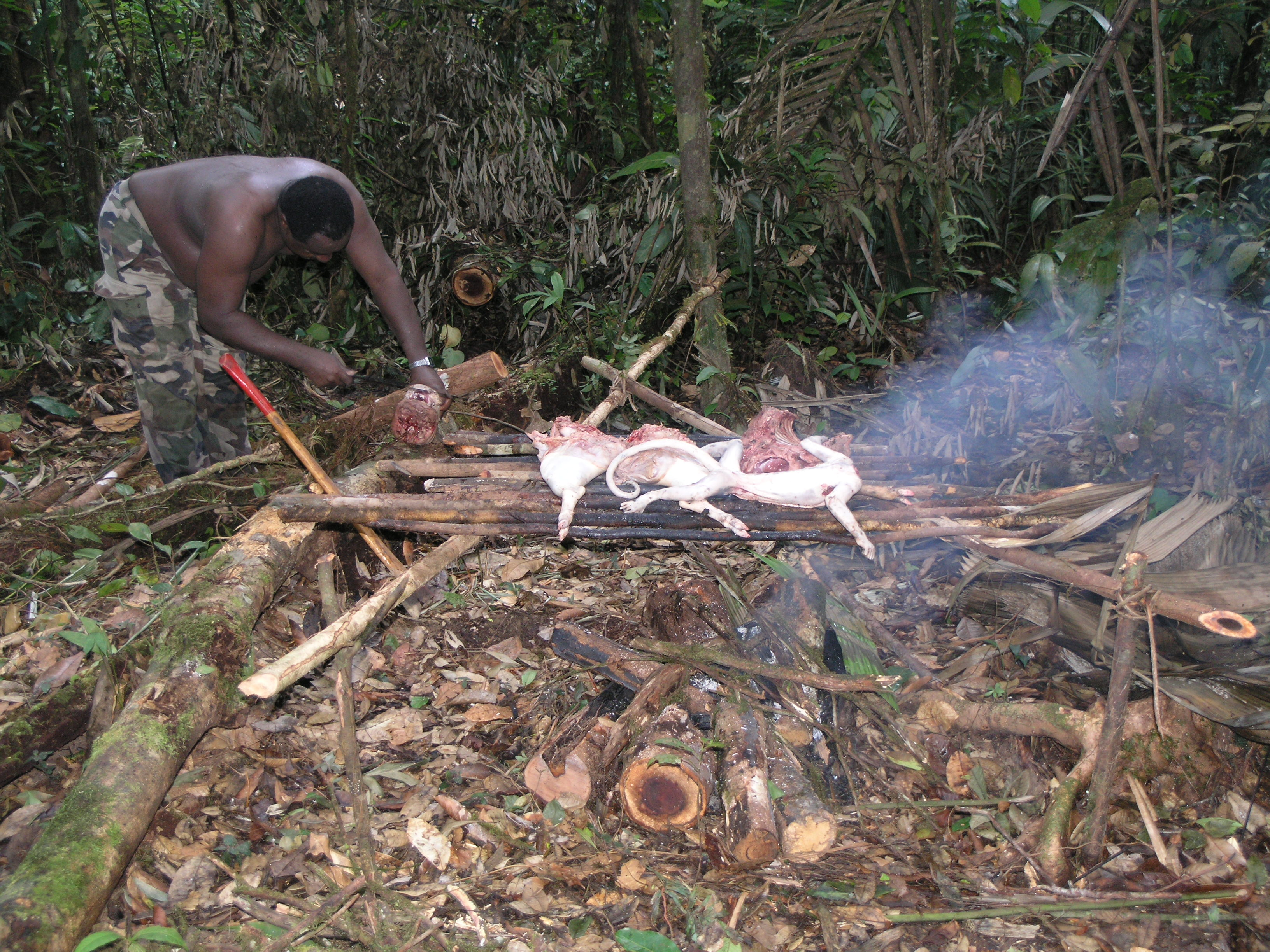 Boucanage de gibier (pécari à collier et macaque brun) en forêt guyanaise.